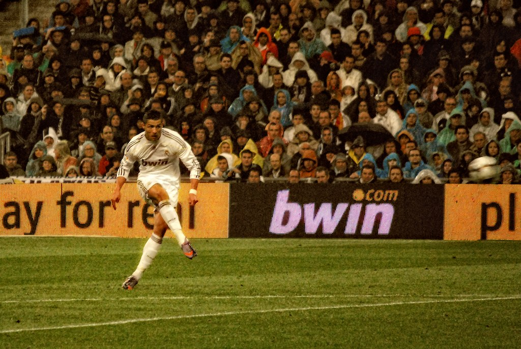 Cristiano vs. At.Bilbao